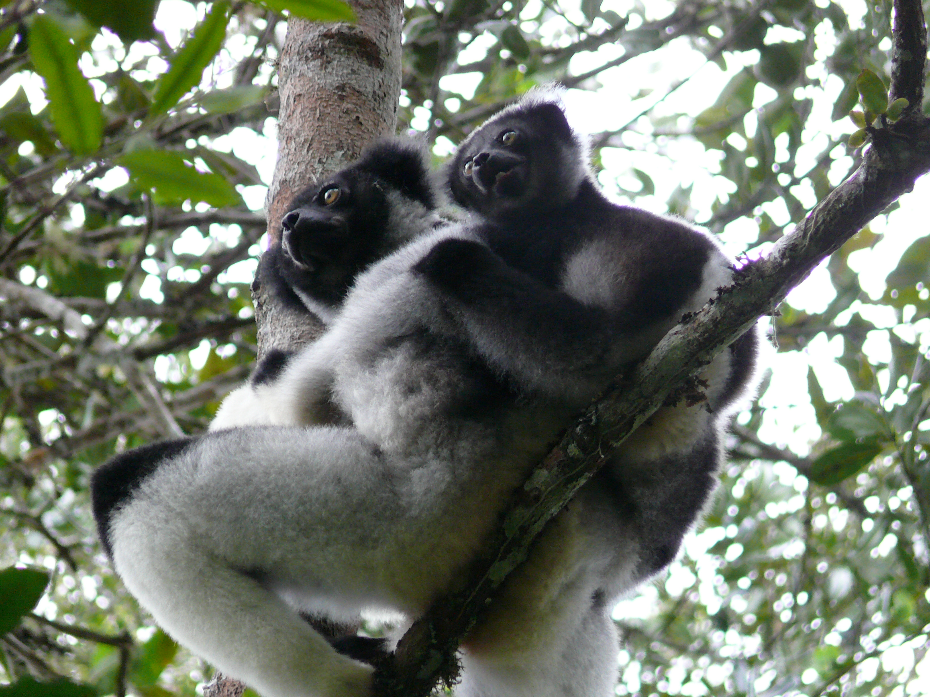 Un indri et son petit